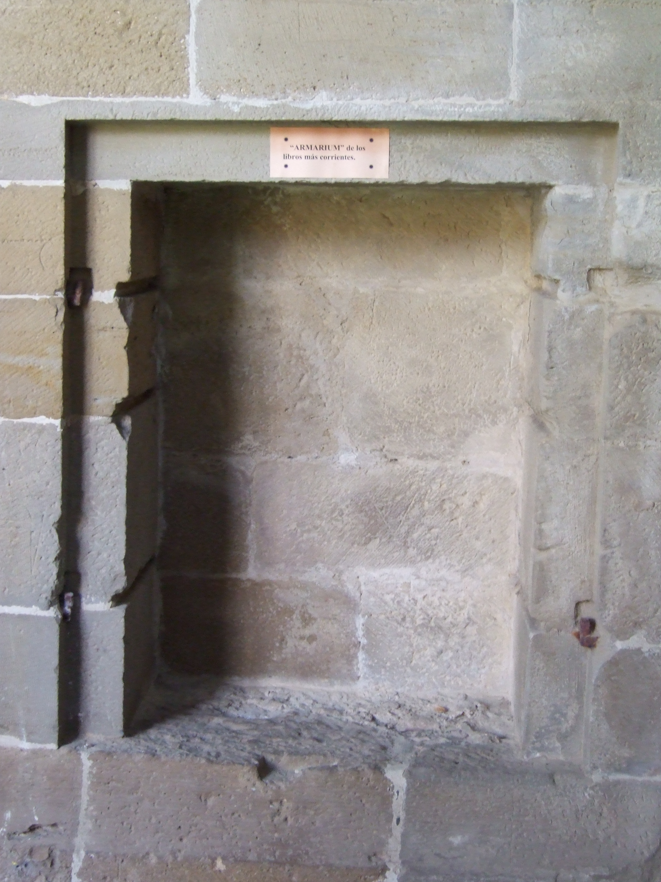 Monasterio de la Oliva - Armarium para libros en la entrada a la sala capitular en el claustro